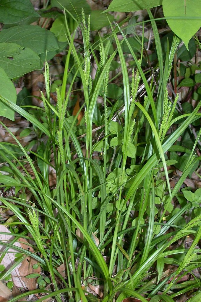 Carex ischnostachya var. fastigiata：オキナワジュズスゲ 2003/05/06 和歌山県田辺市：Tanabe City. Wakayama Pref. Japan